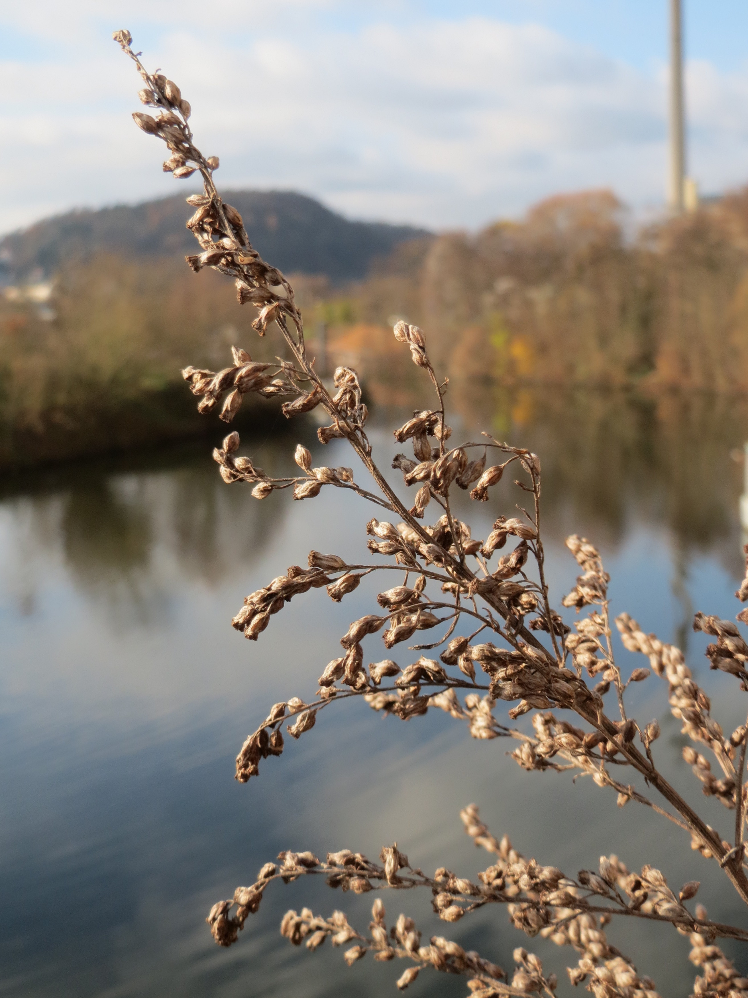 Beifuß (Artemisia vulgaris) am Osthafen in Saarbrücken